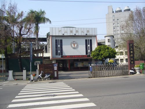 中山醫學大學正門